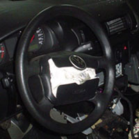 Подушка безопасности VW PassatВид сработавшей подушки безопасности